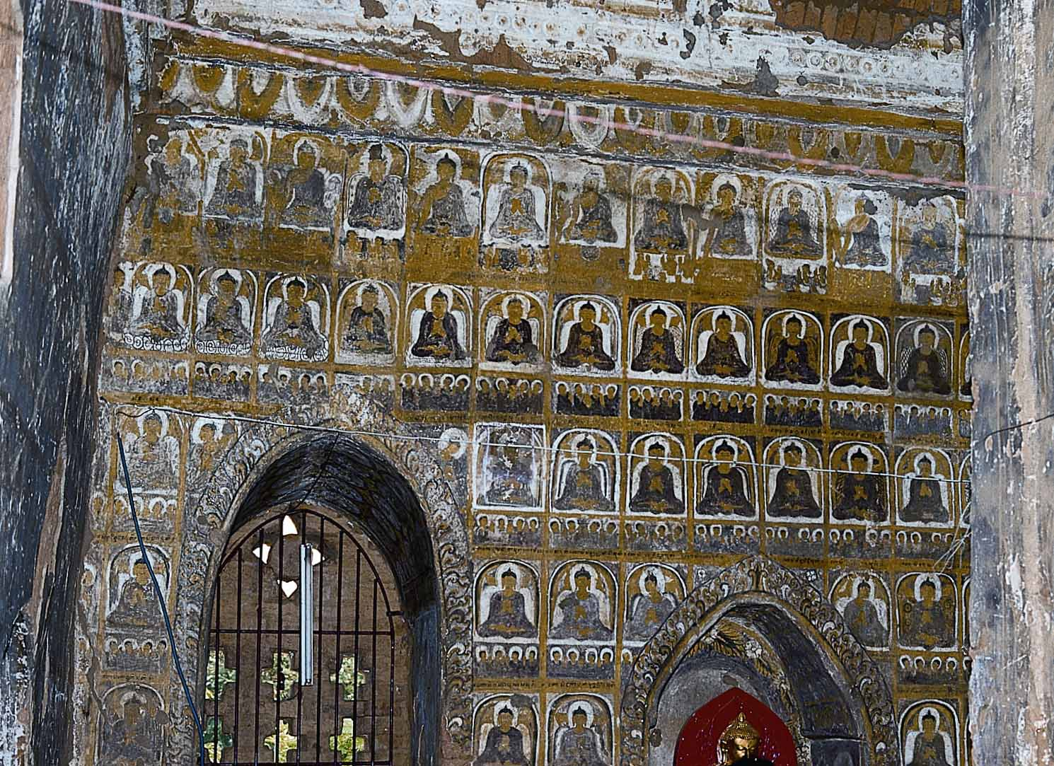 Sanctuaire de l'Alopyi-gu-hpaya, mur extérieur du déambulatoire complètement peint Bouddhas du passé dans le rang supérieur, Bouddha dispensant ses sermons dans la partie inférieure